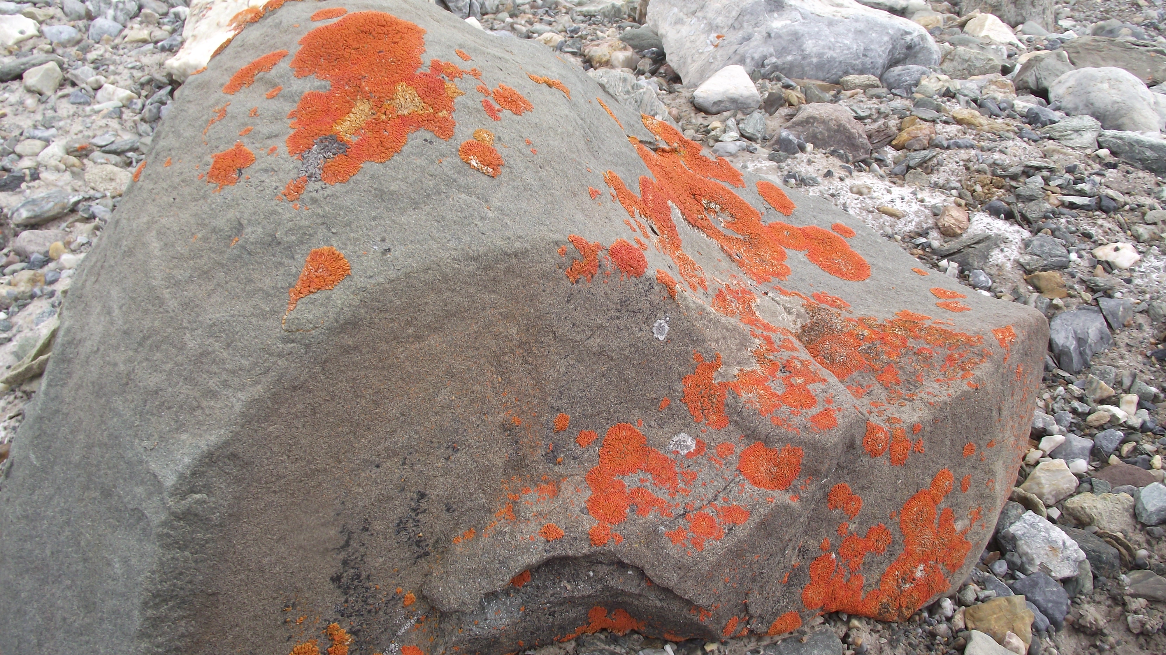 Oranje korstmos op een steen in Spitsbergen